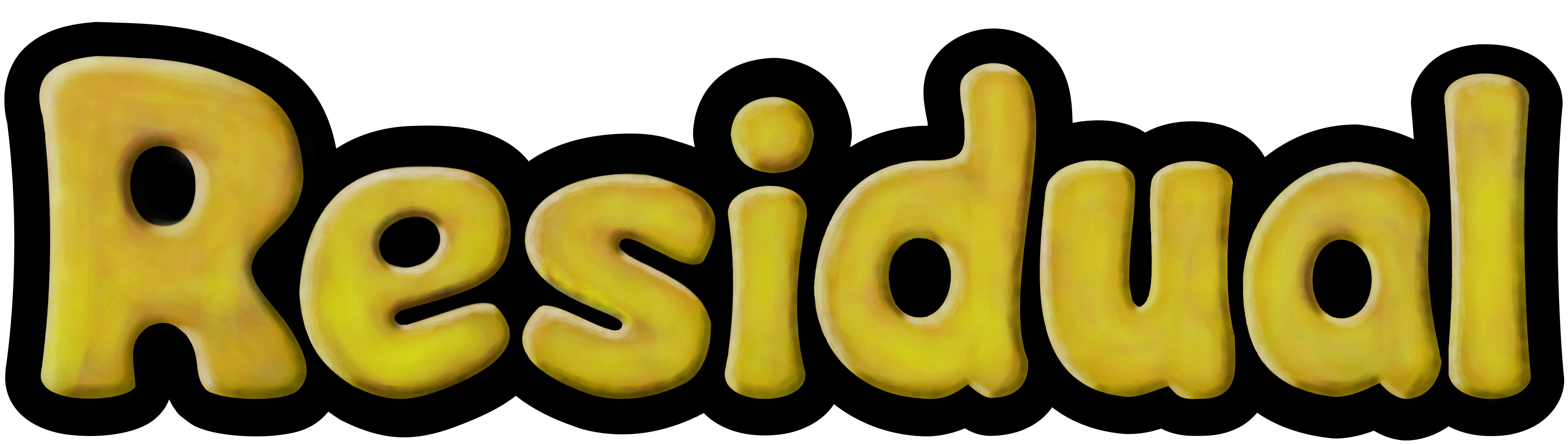 ResidualVM icon